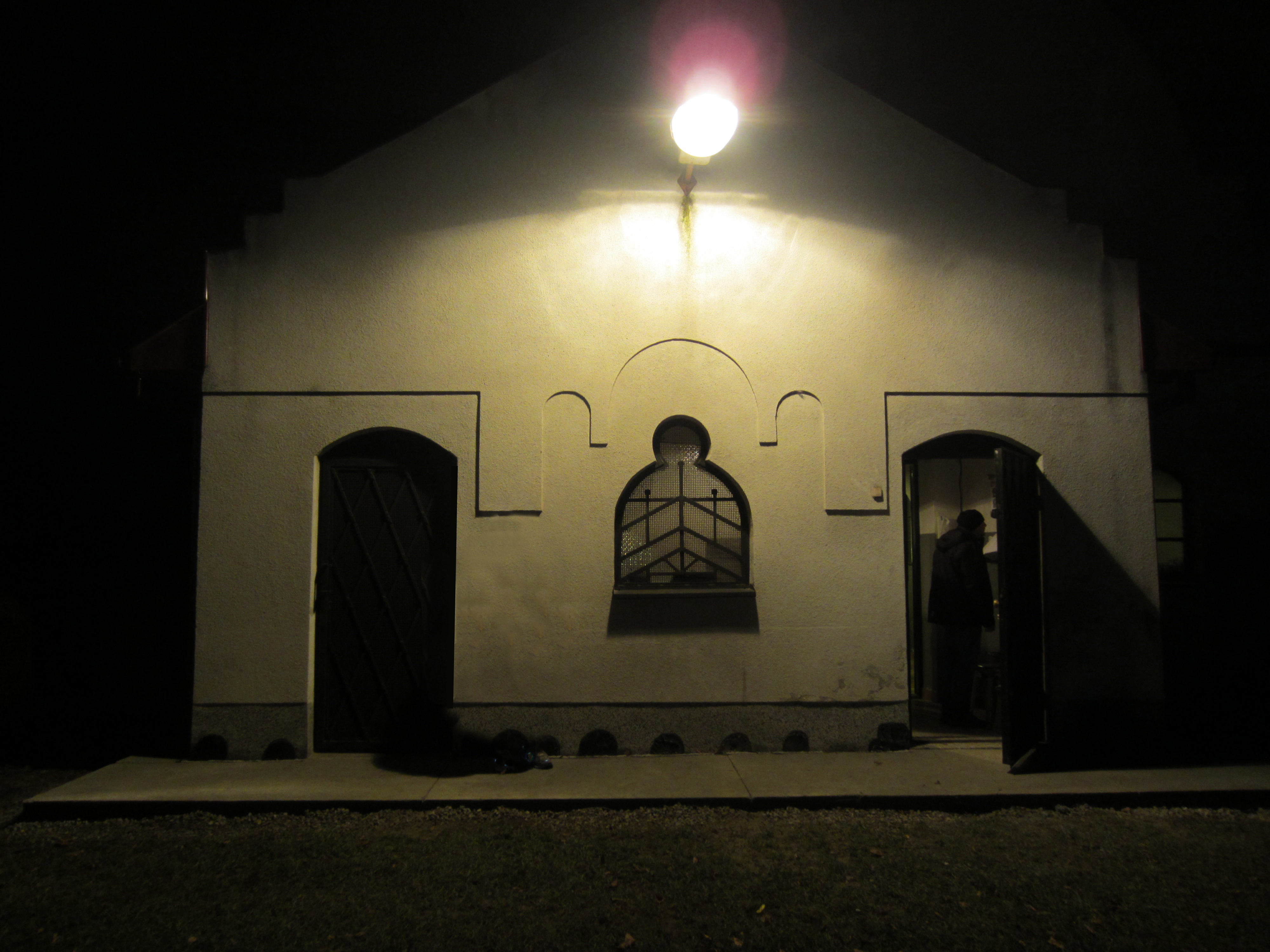 אוהל הדברי חיים מצאנז.jpg